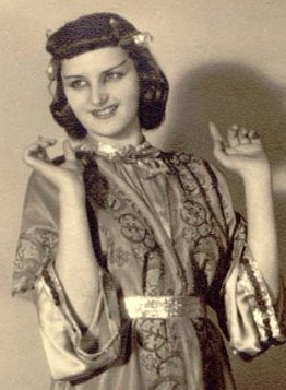 Györffy Rózsa magyar színésznő Mi szerepében a Mosoly országában